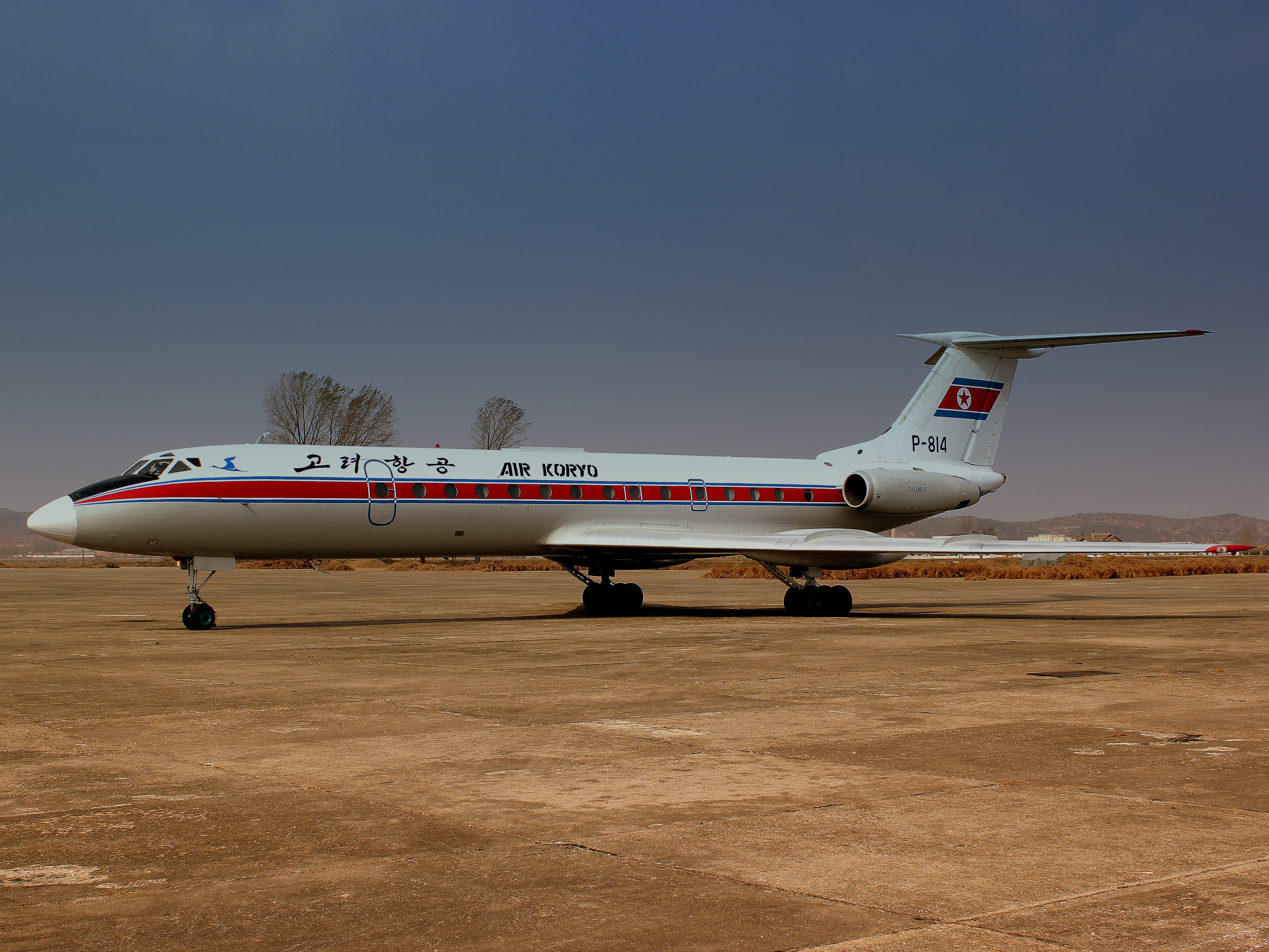 P814 AIR KORYO TU134 AT SONDOK AIRFIELD HAMHUNG DPR KOREA OCT 2012